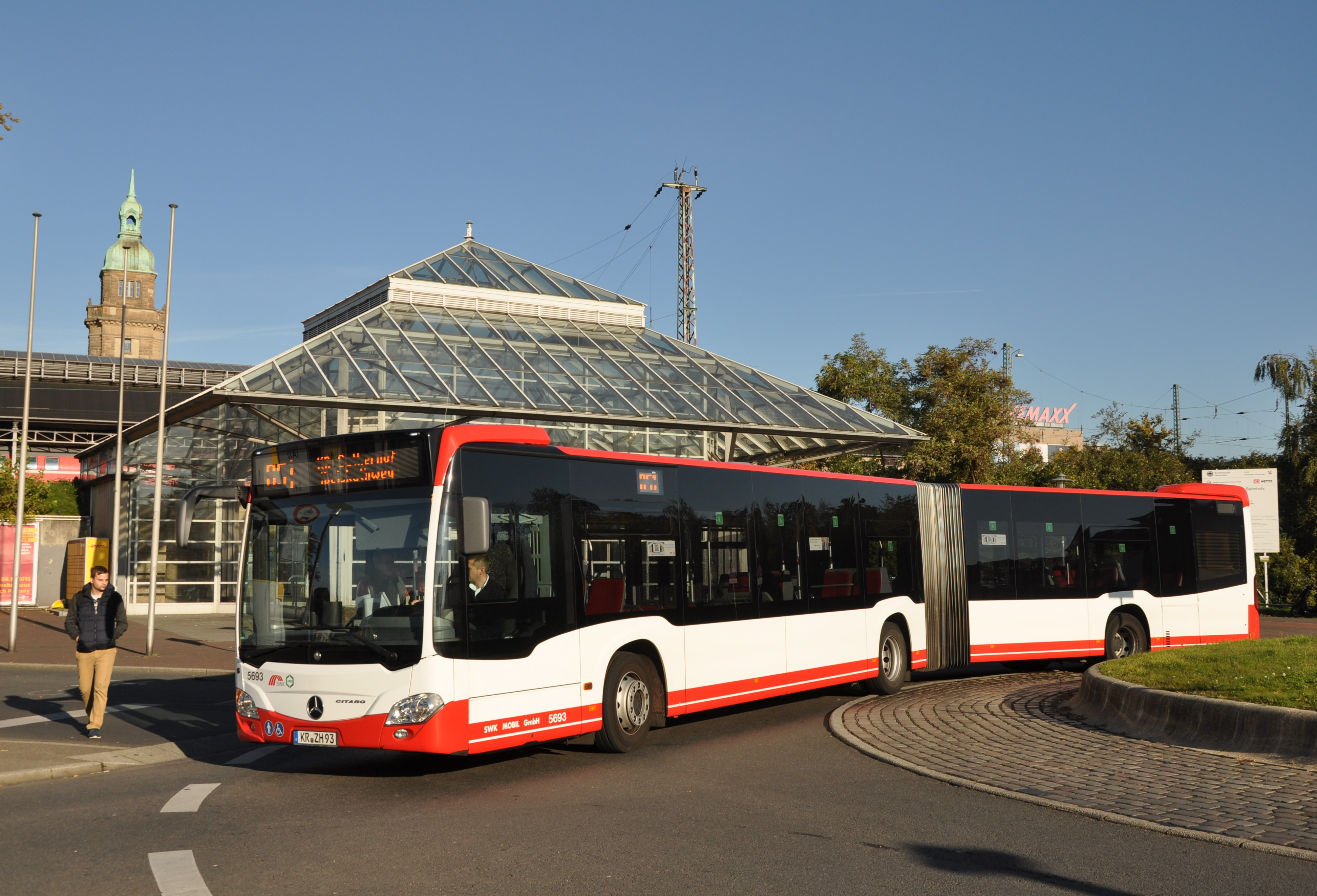 Stadtbus der SWK Mobil vor dem Krefelder Hauptbahnhof